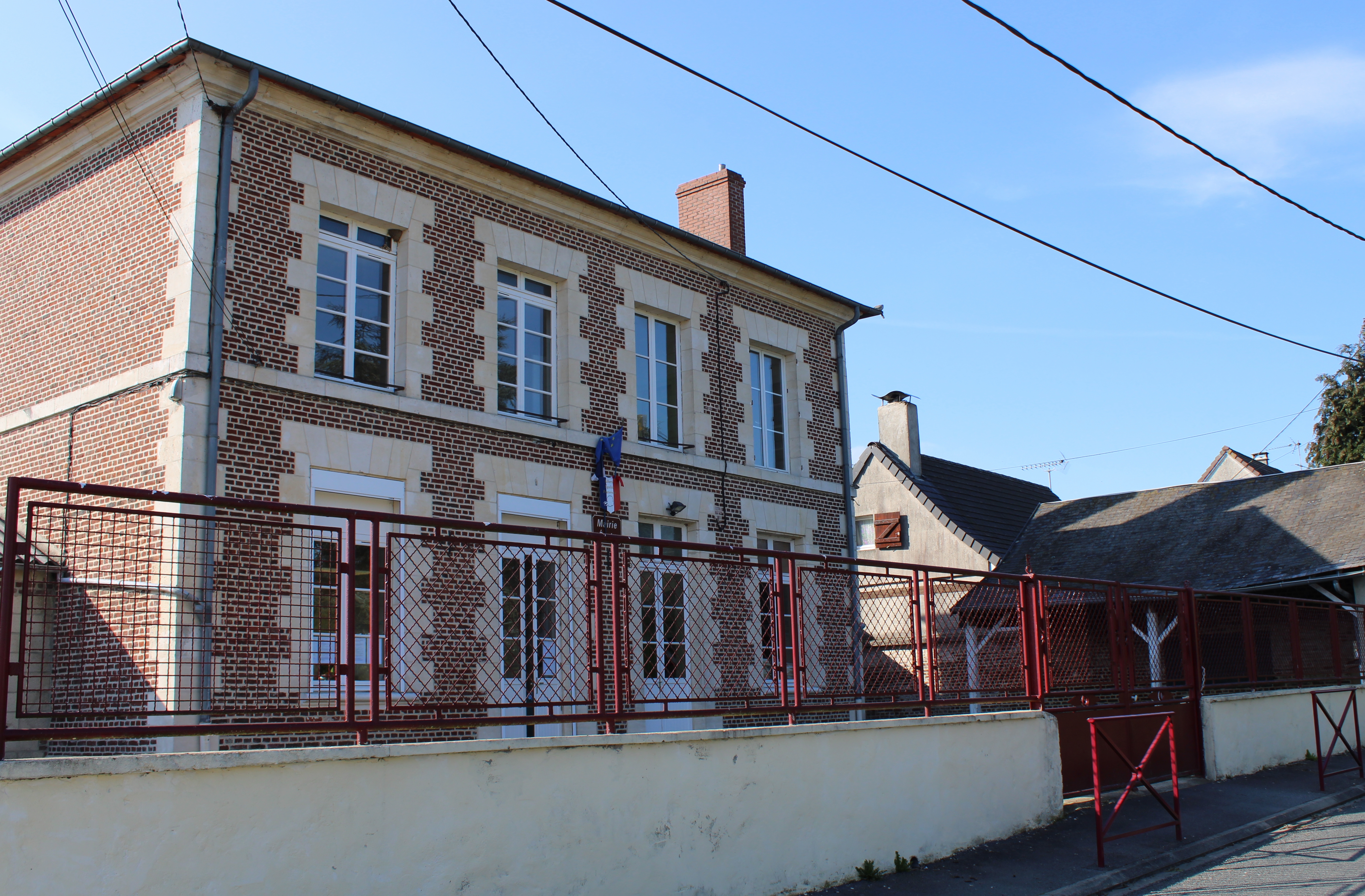 La mairie.